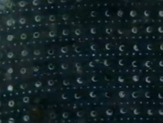 Nahaufnahme eines Stückes des Tarnüberzuges von U-480